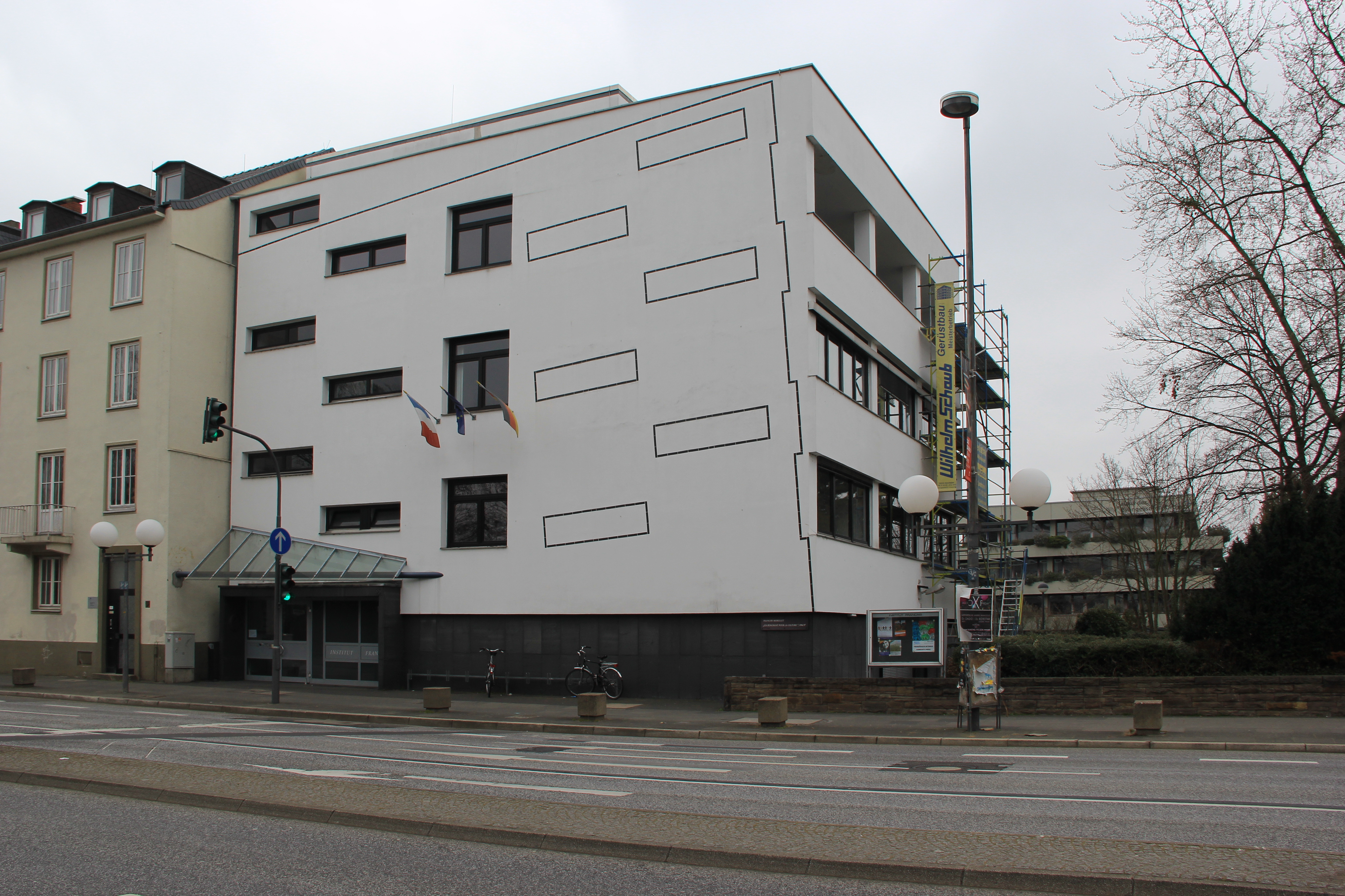 Institut Français in Bonn, Adenauerallee 35.